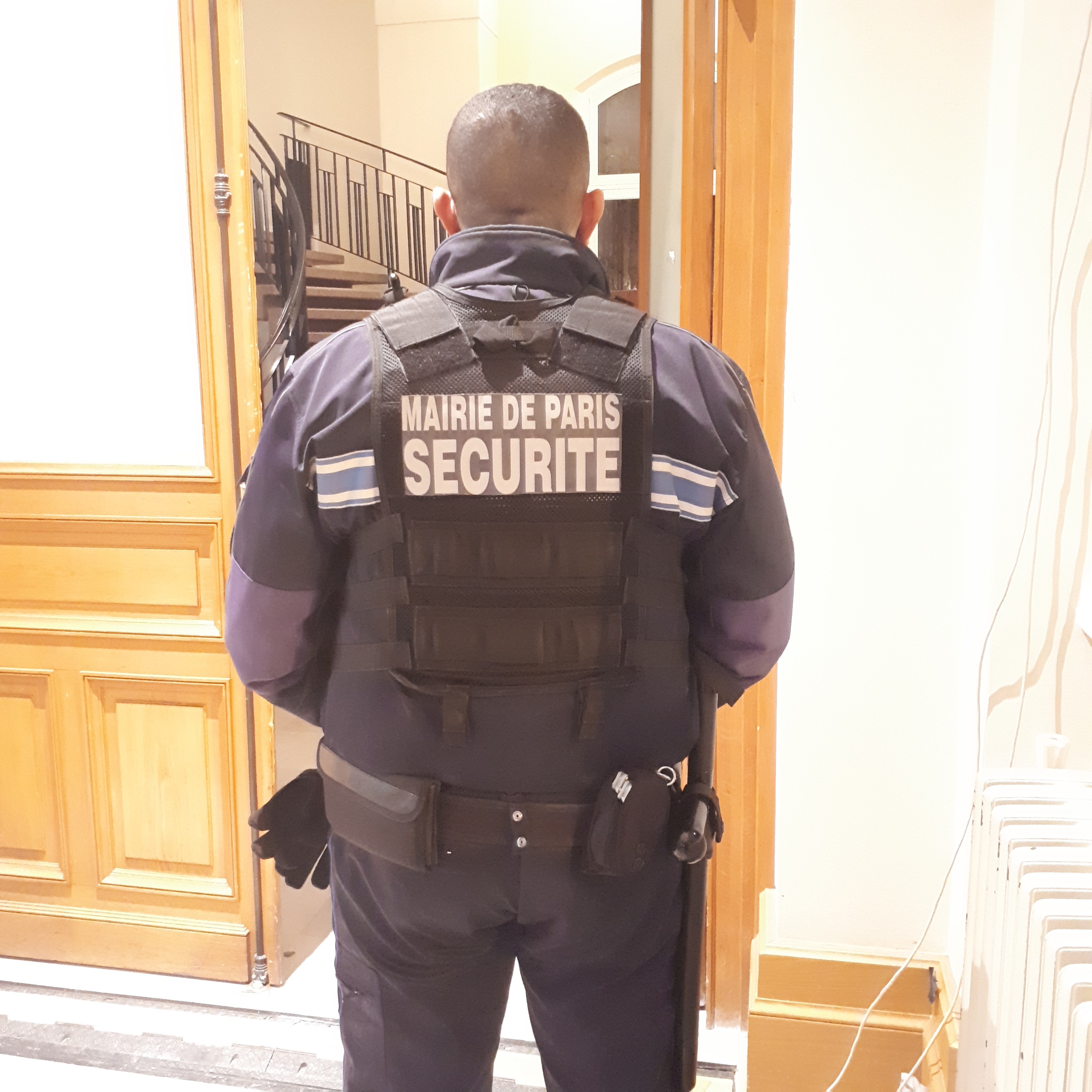 inspecteur de sécurité de la ville de Paris en sécurisation